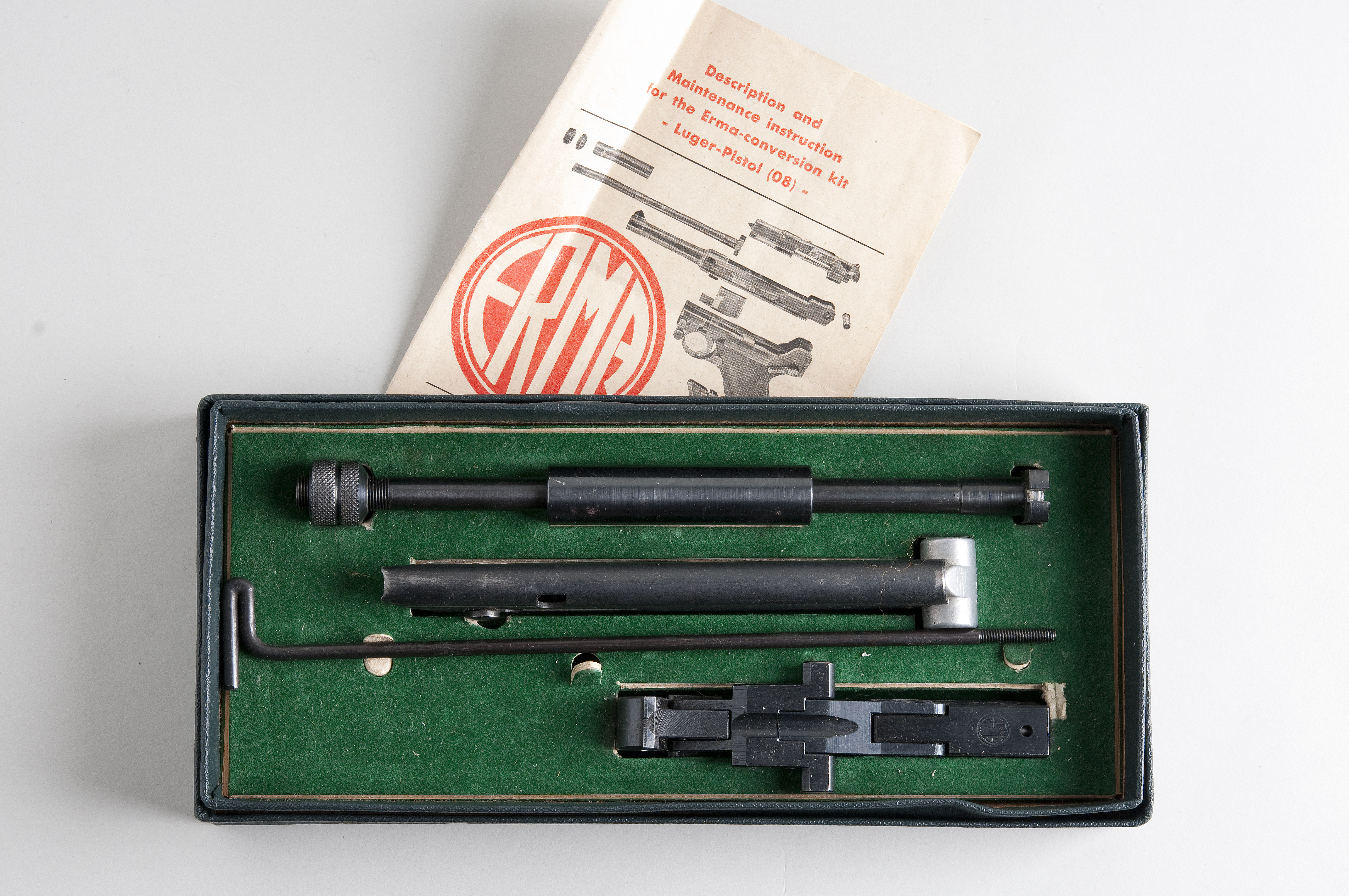 Erma innleggssett From flickr user handvapensamlingen - Pistols used in Norway.